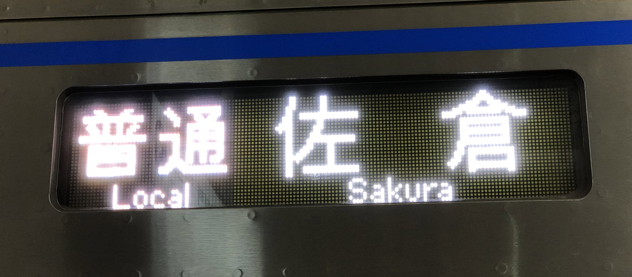 京成3000形の側面LED表示器